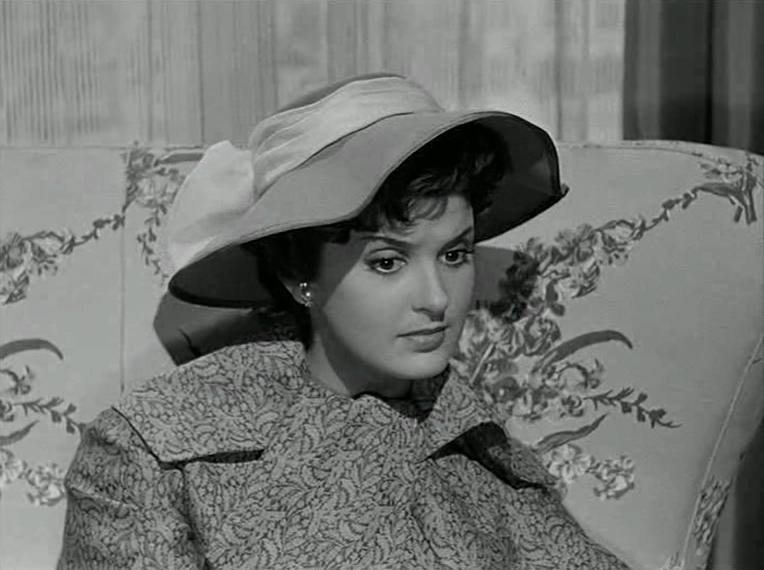 Irène Tunc nel film Bravissimo (1955)